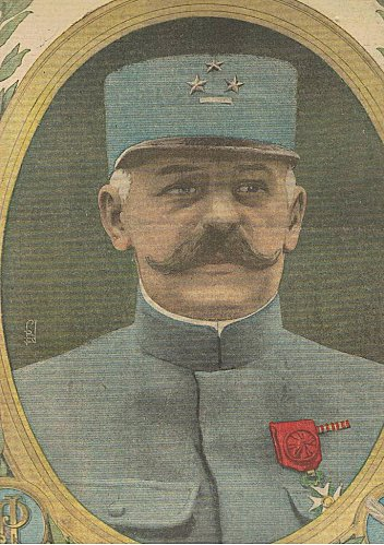 Der französische General des ersten Weltkriegs Denis Auguste Duchêne (1862-1950).